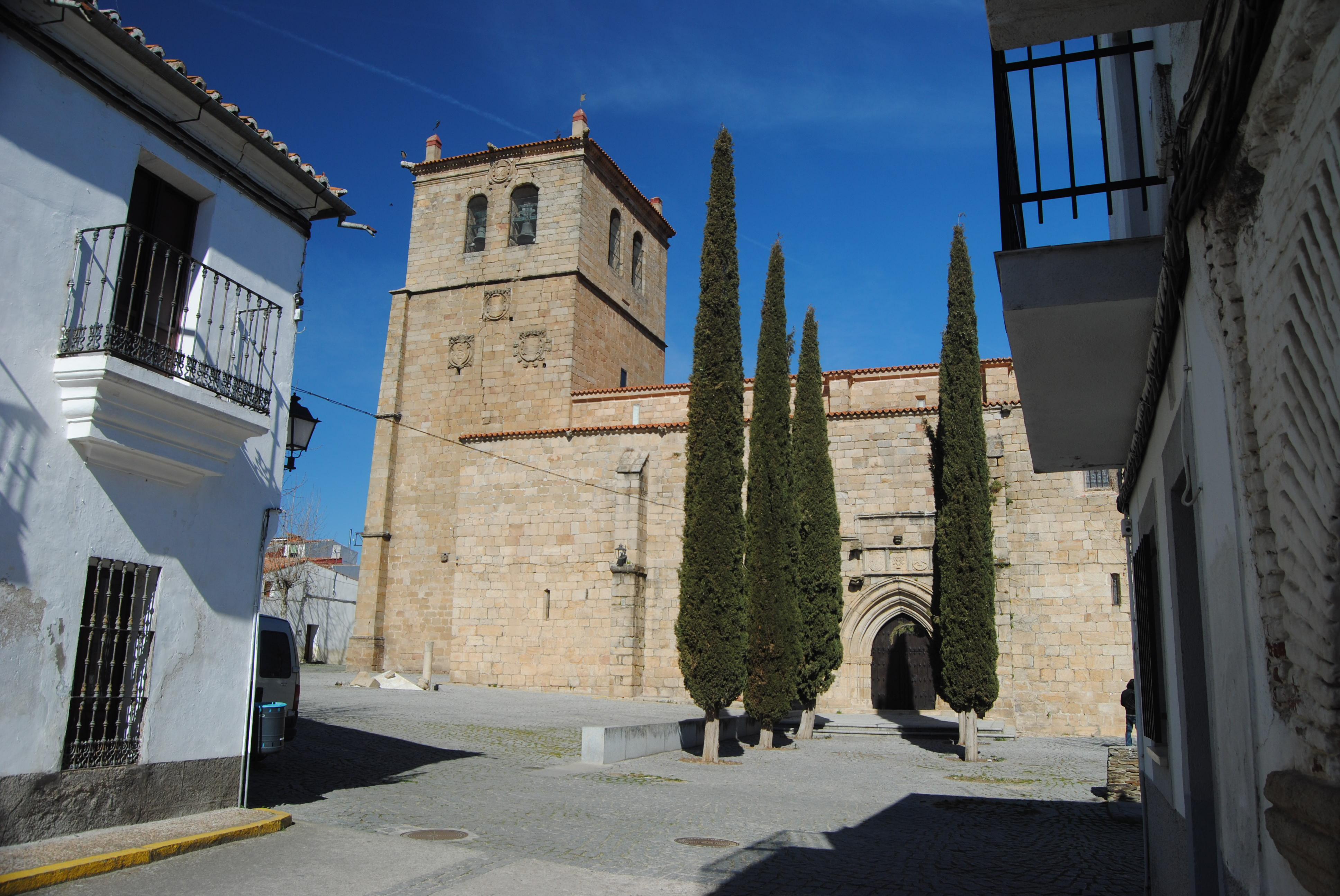 Iglesia de San Pedro, Garrovillas de Alconétar, provincia de Cáceres, España.